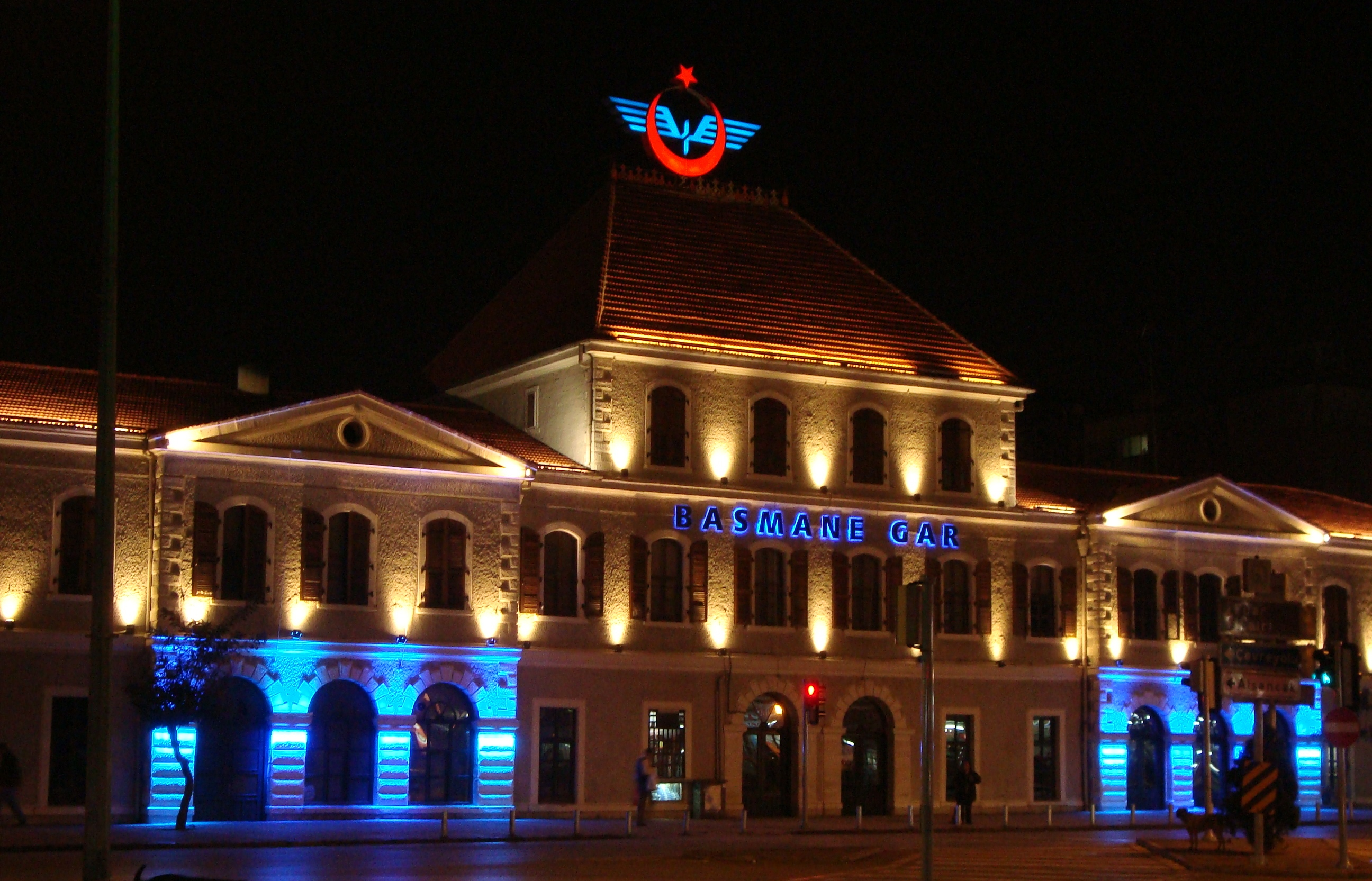 Basmane tren garı-İzmir